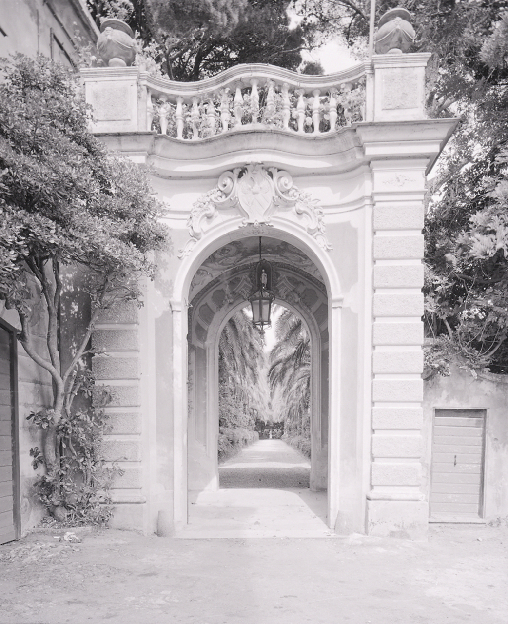 Servizio fotografico : Genova, 1963 / Paolo Monti. - Buste: 11, Fototipi: 11 : Negativo b/n, gelatina bromuro d'argento/ pellicola ; 10x12. - ((Serie costituita da 11 buste sciolte di negativi identificati con i nn.: 6598, 6599, 6600, 6601, 6602, 6603, 6604, 6610, 6611, 6612, 6613. - All'interno della scatola denominata "6401-6800 G" nella successione numerica in cui sono disposti i negativi in corrispondenza del n. 6597 cartonicino con iscrizione manoscritta a pennarello: "6597/ N° annullato". - La suddetta serie è contenuta nella scatola G6401-6800, formato 24x30. - Sull'agenda denominata "R 1 - Monti/ 1 aprile 1963 - 6 giugno 1964/ 6000-8193", in corrispondenza dell'indicazione della suddetta serie appunto manoscritto: "Villa con torre e cavalcavia sulla Crosa a Quarto". - Il negativo identificato con il numero 46397 è stato realizzato per Zodiac. - Occasione: Documentazione per la pubblicazione: Italia Nostra (a cura di), "Le ville genovesi", catalogo della mostra, Genova 1962, Genova, Comune di Genova, 1967. - Fonte: Monografia di Italia Nostra (a cura di): Le ville genovesi, catalogo della mostra, Genova 1962, Genova, Comune di Genova (1967). - Fonte: Lettera di Paolo Monti: I. Carteggi/ Genova - Enrico (1963-1966), presso Archivio Paolo Monti. Camicia con documenti dattiloscritti e manoscritti vari relativi al lavoro eseguito per Italia Nostra: preventivi, lettere, inventari. - Fonte: Rubrica di Paolo Monti: Archivio fino 1-4-1961/ 31-3-1963 (1961-1963), presso Archivio Paolo Monti. - Fonte: Agenda di Paolo Monti: R 1 - Monti/ 1 aprile 1963 - 6 giugno 1964/ 6000-8193 (1963-1964), presso Archivio Paolo Monti